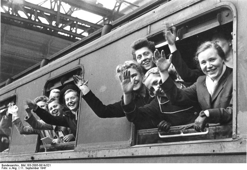 ADN-ZB/ Illus-dpd Deutsche Studenten zum Ernteeinsatz nach England, In Begleitung von 2 englischen Universitäts-Offizieren traten am 11-9-47 191 männliche und 18 weibliche Studenten der Hansestadt Hamburg eine 6 wöchige Reise nach England an. Dort werden die Studenten im Ernteeinsatz helfen. Unser Bild zeigt die Abfahrt der Studenten vom Hamburger Hauptbahnhof. Von hier geht es über Hoek van Holland nach Harwich. 11-9-47 843-47